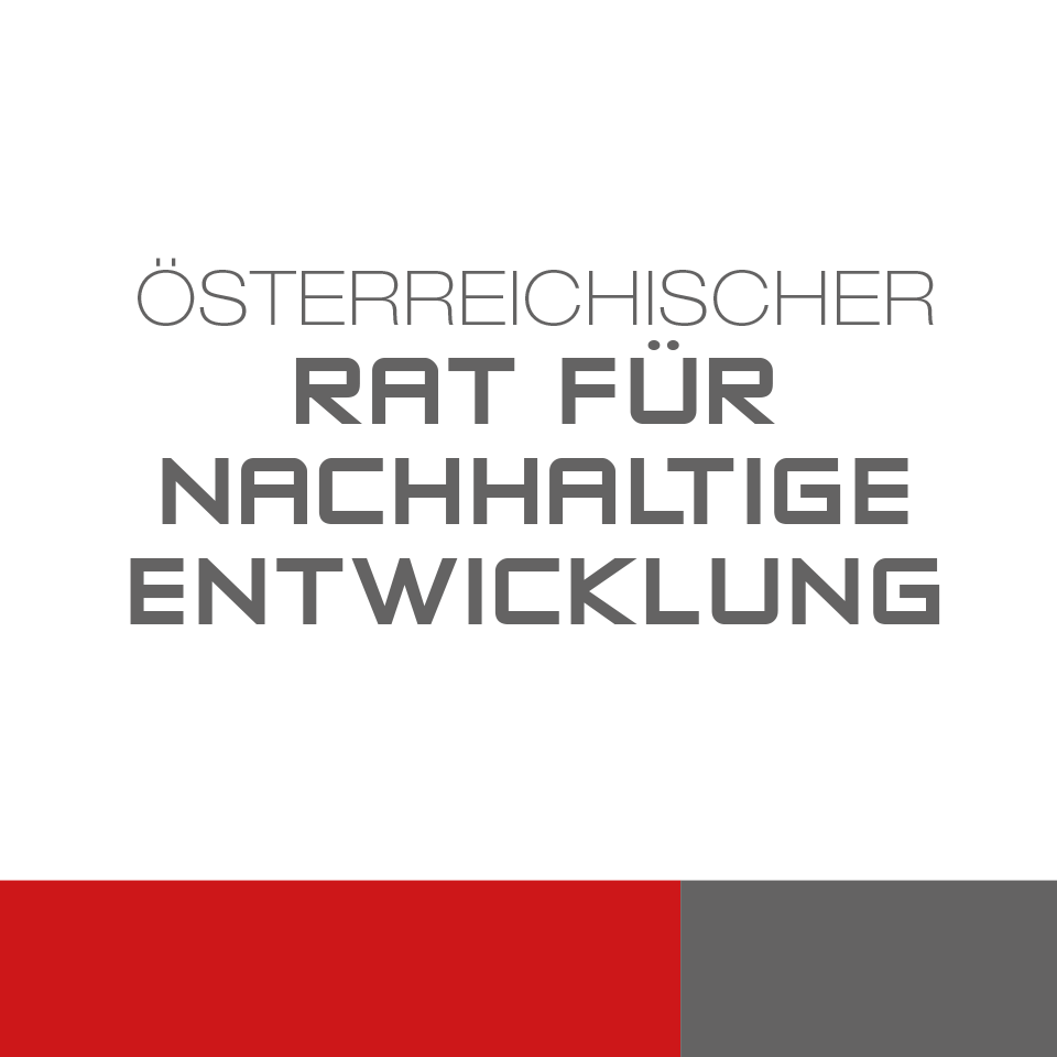 Österreichischer Rat für Nachhaltige Entwicklung